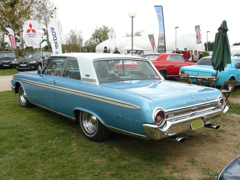 Mantes la Jolie 2012